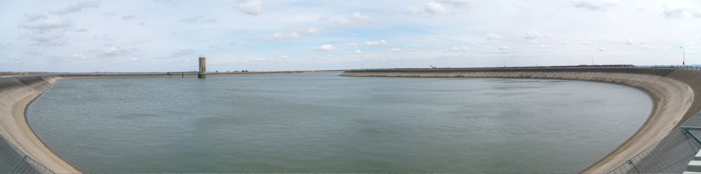 Niklosbierg: vue op d'Basengen vum Pompelspäicherwierk. 01.04.2008